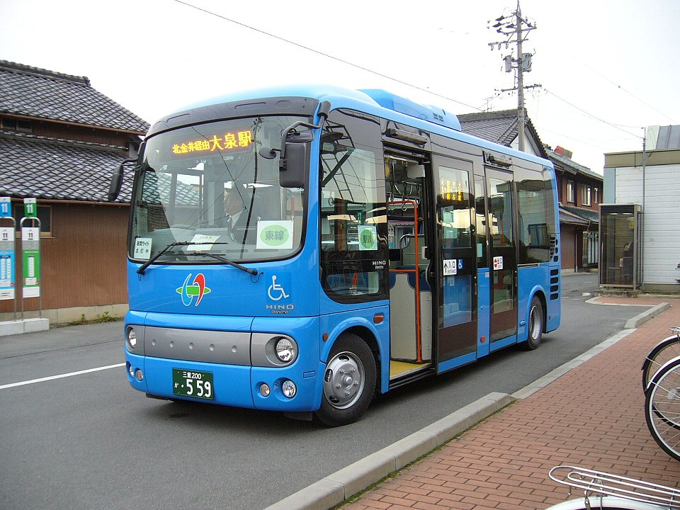 アイバス 員弁東線系統 日野ポンチョ 楚原駅前にて